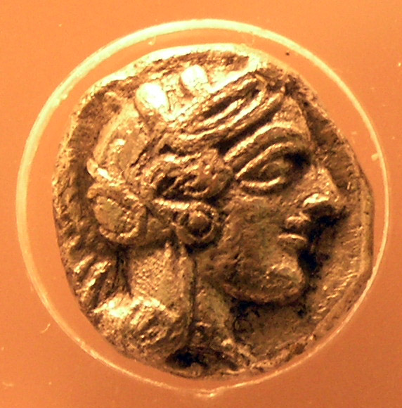 Drachme athénienne du Ve siècle av. J.-C. Musée de l'Agora antique d'Athènes. Photographie prise par Μαρσύας (2005)